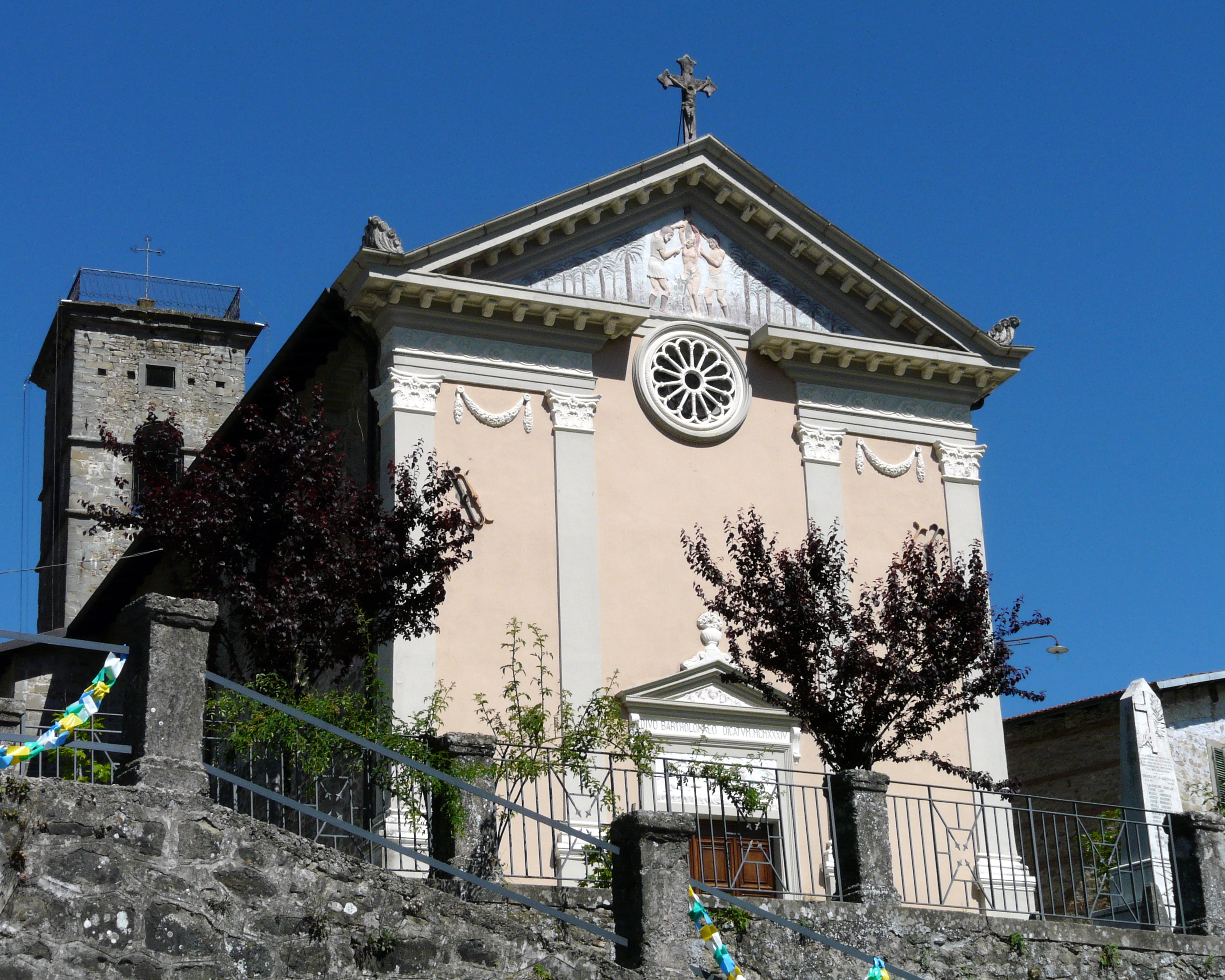 La chiesa di San Bartolomeo di Sillano, Toscana, Italia